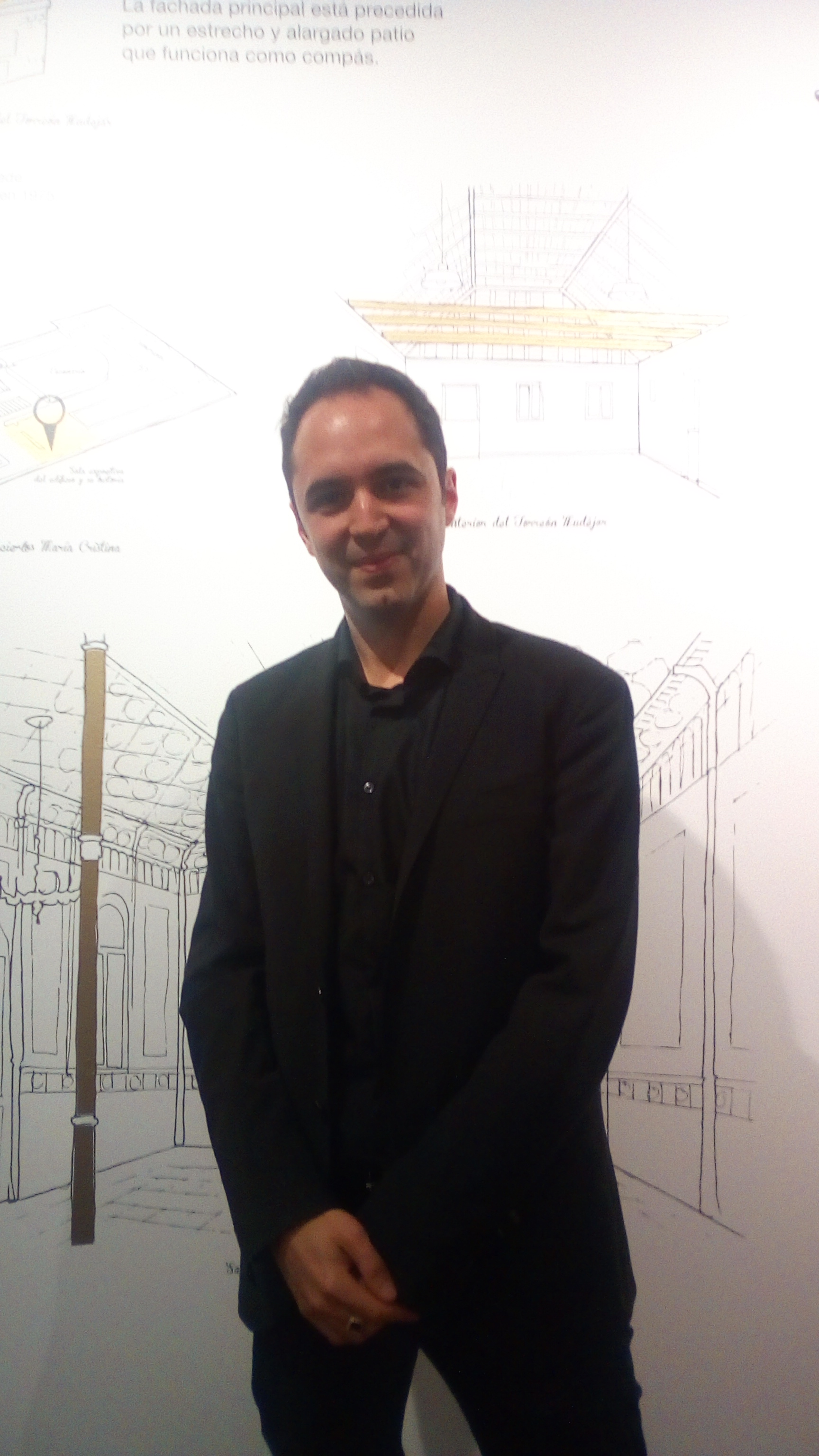 Violinista español